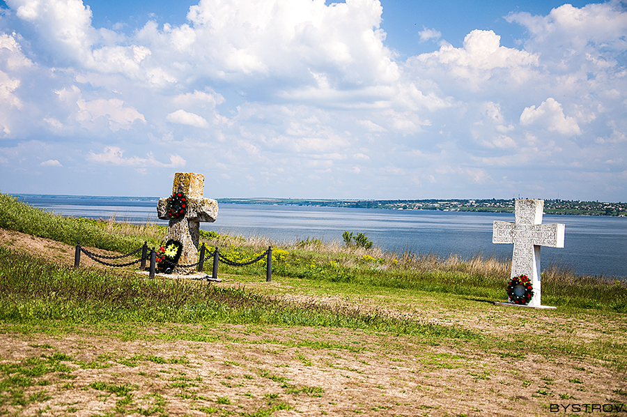 Каменская Сечь